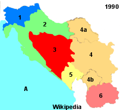 vm. Joegoslavie. Eigen werk